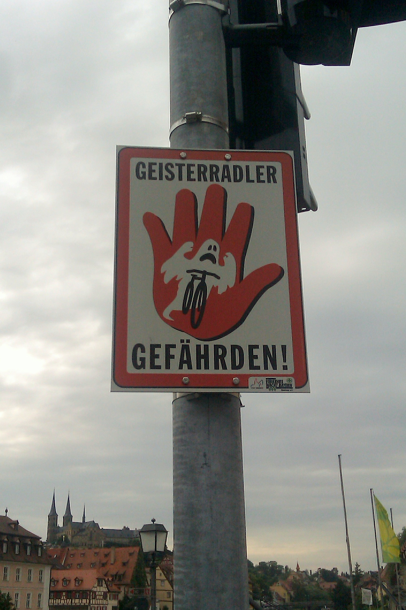 Hinweisschild "Geisterradler gefährden" Aufgenommen in der Langen Straße in Bamberg (Bamberger Dom im Hintergrund)